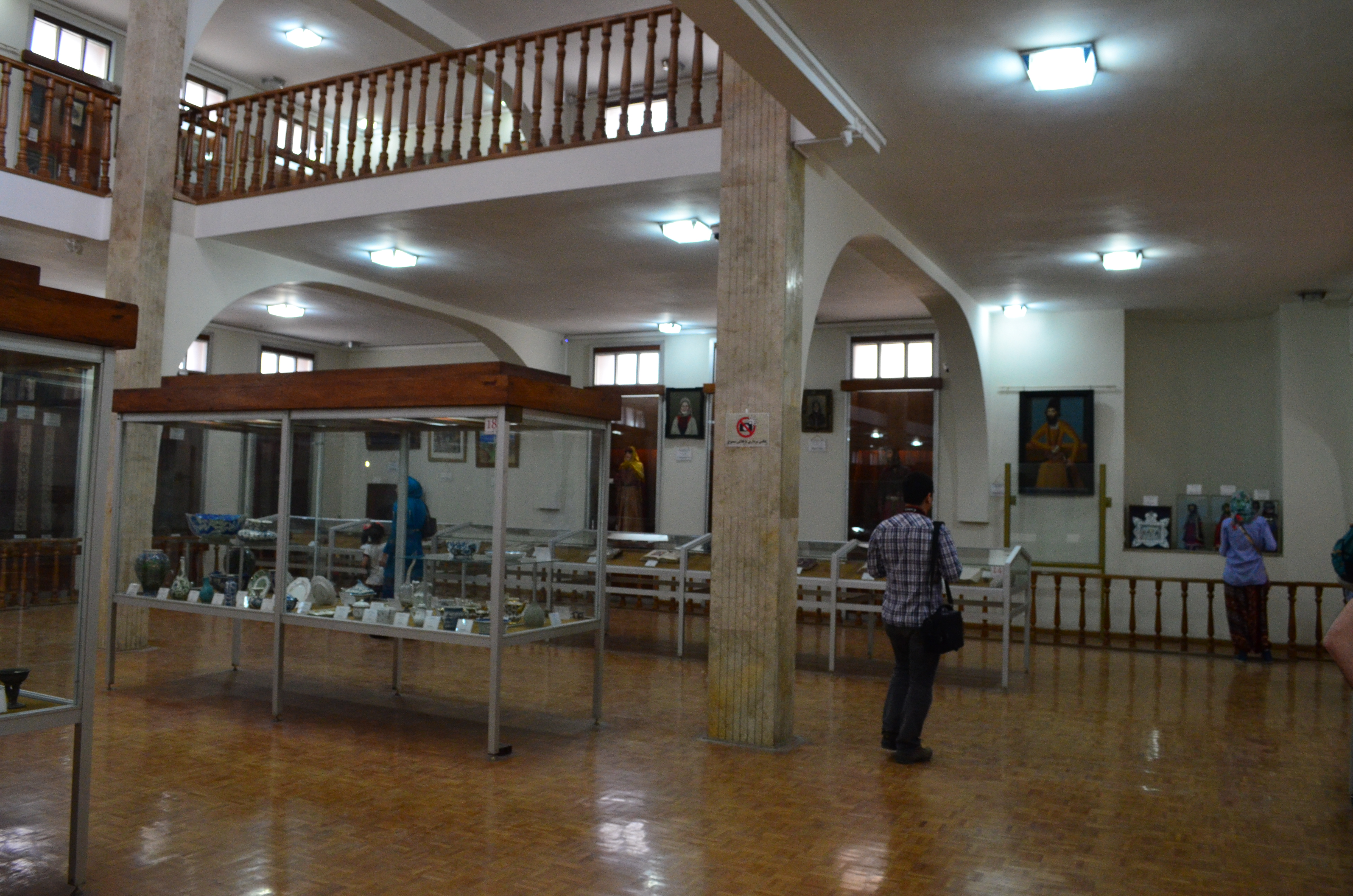 کلیسای وانک، اصفهان، ایران